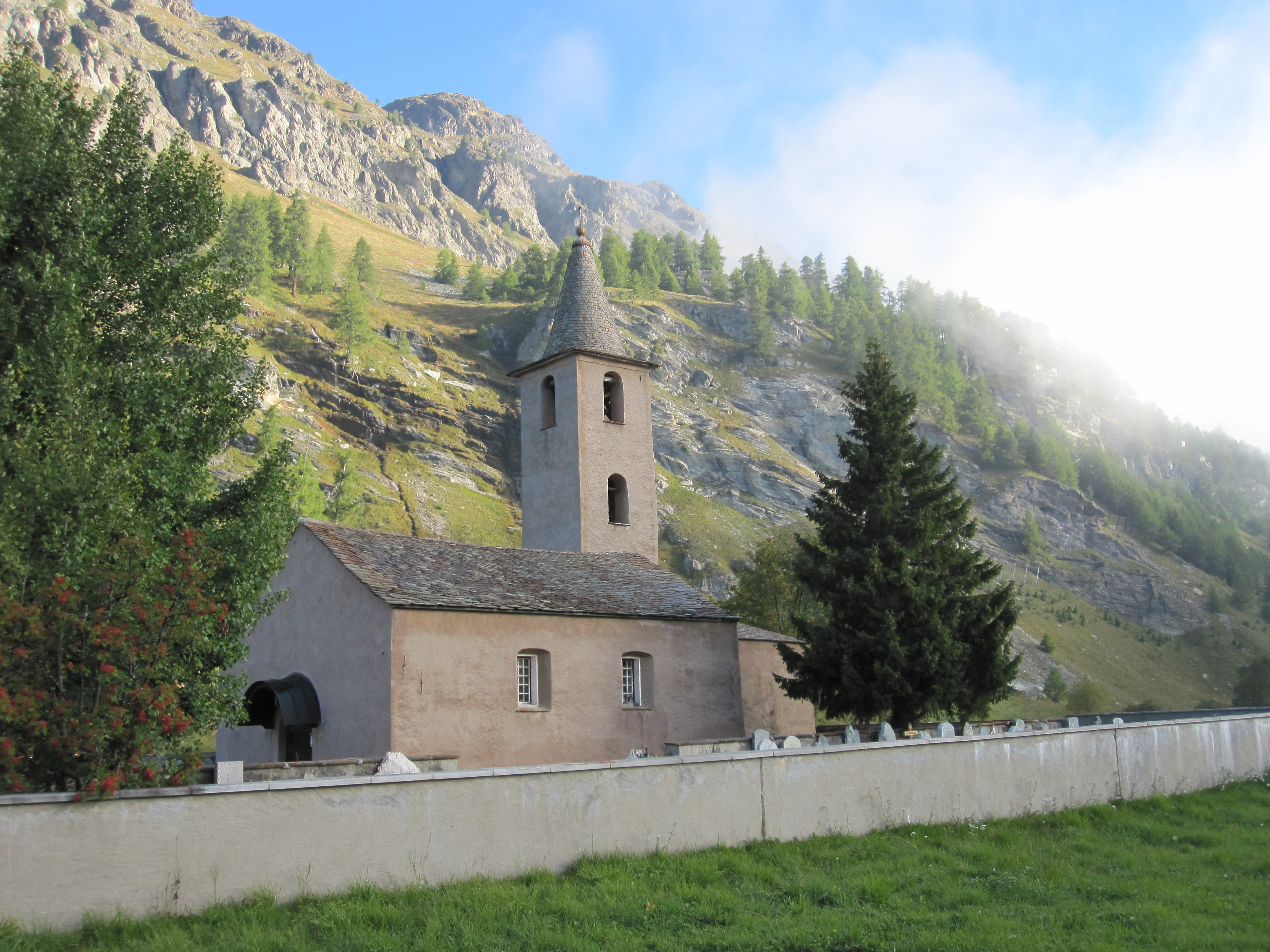 reformierte Kirche Sils-Baselgia (Oberengadin, Kanton Graubünden)